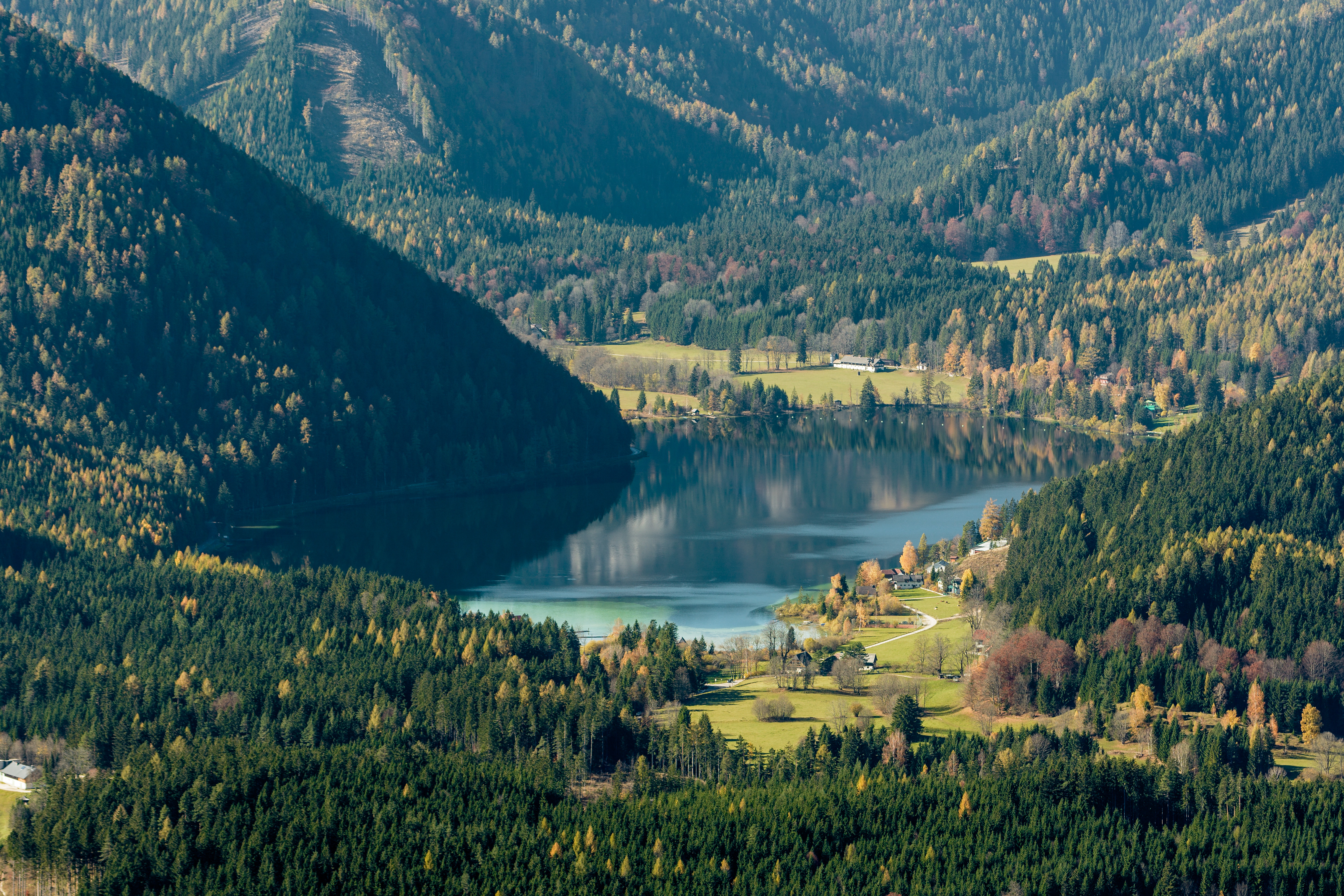 Erlaufsee in Niederösterreich-Steiermark gesehen von der Bürgeralpe aus (Osten)